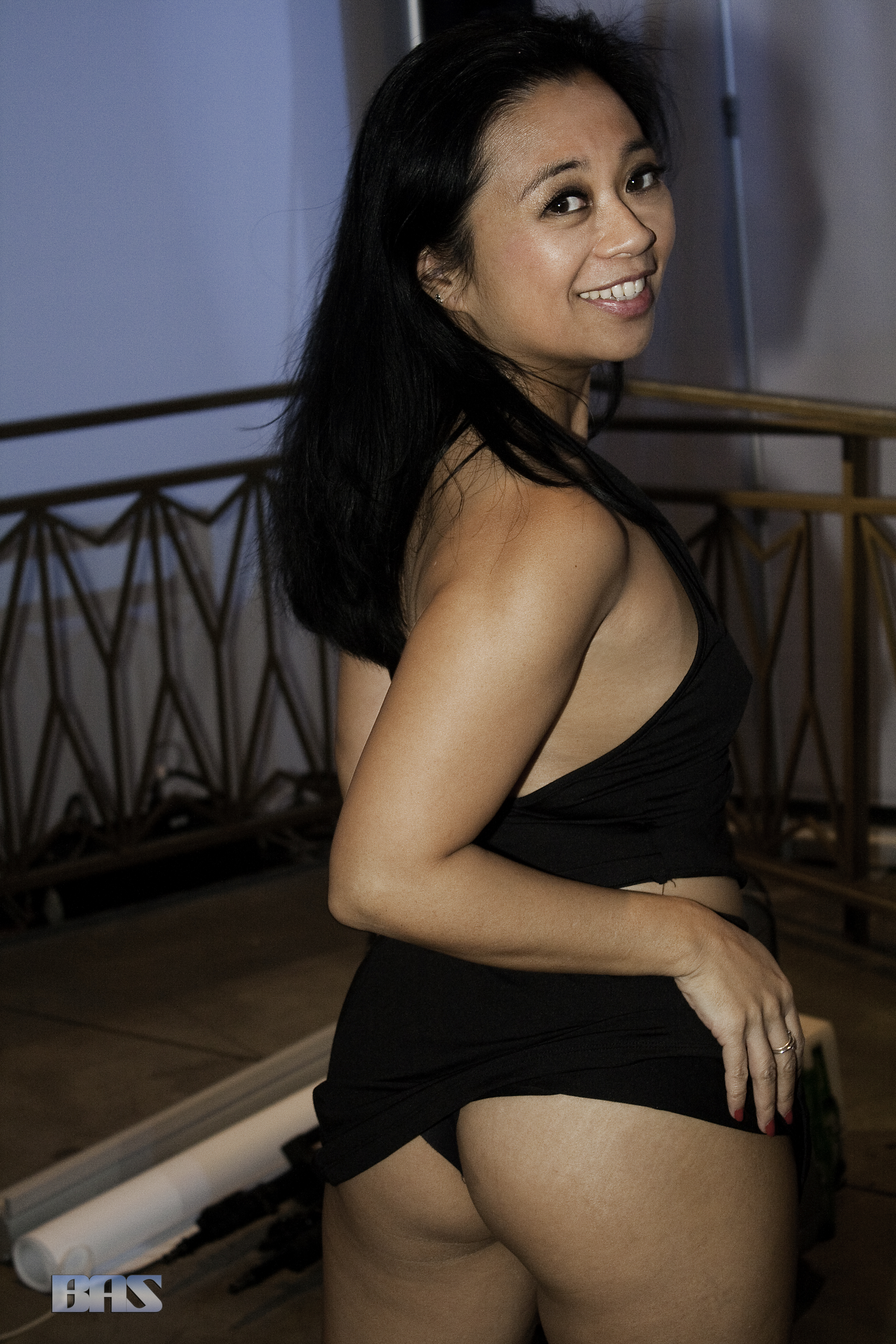 AEE16_0571bas